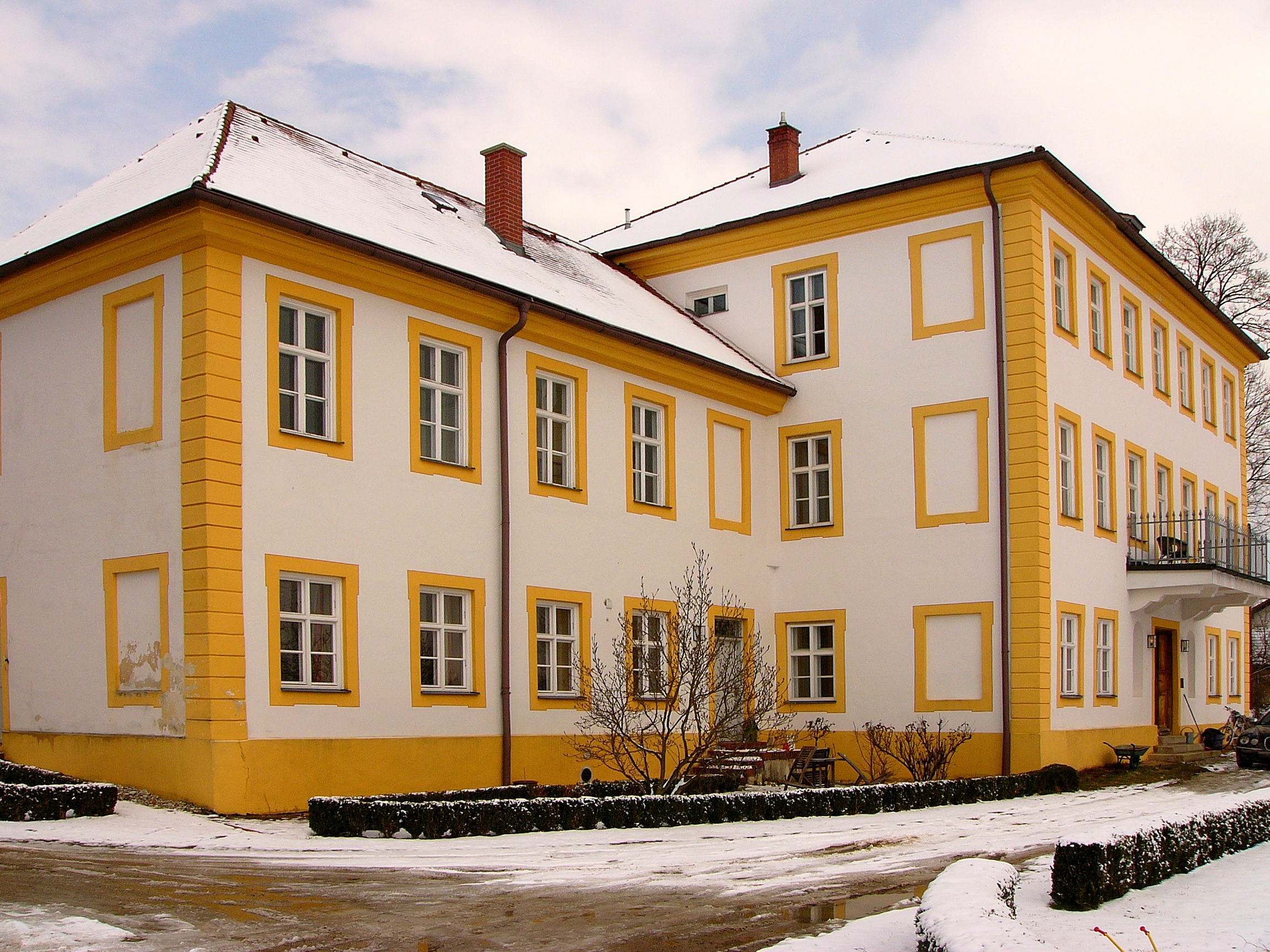 Schloss; klassizistische Dreiflügelanlage, spätes 18. Jahrhundert; mit Ausstattung; Schlosskapelle St. Johannes von Nepomuk; mit Ausstattung; zugehörige Wirtschaftsgebäude, gleichzeitig.This is a photograph of an architectural monument.